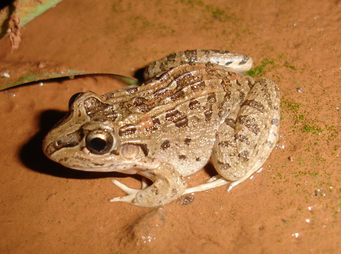 Leptodactylus chaquensis